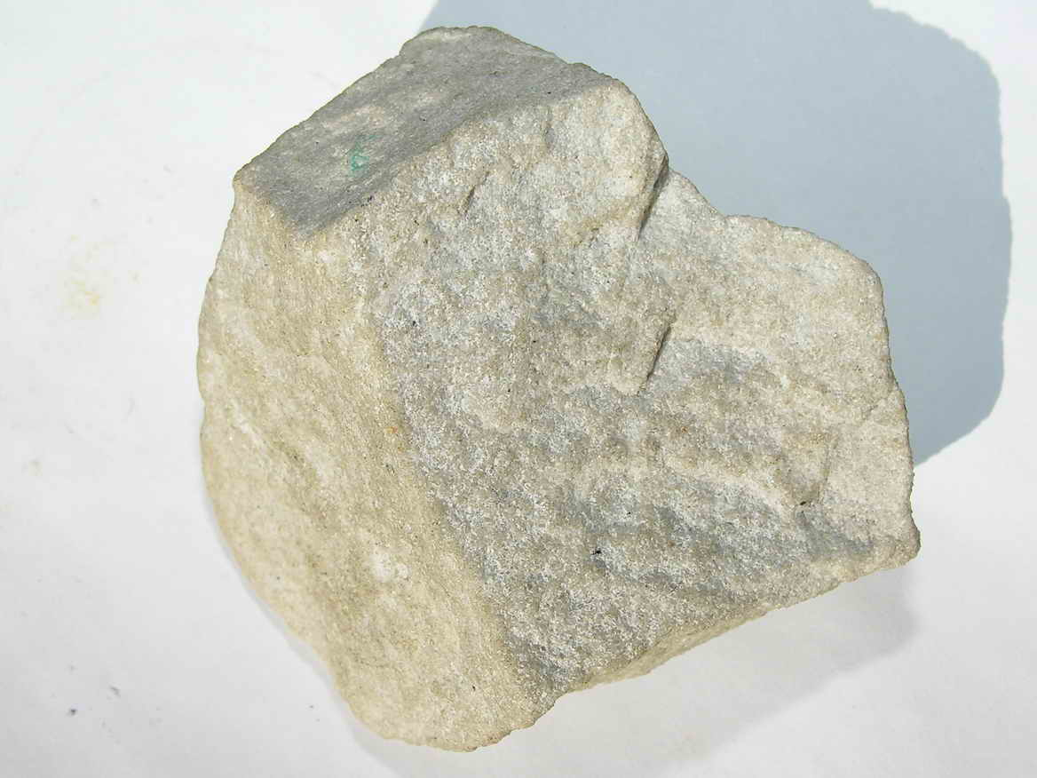 Mármo